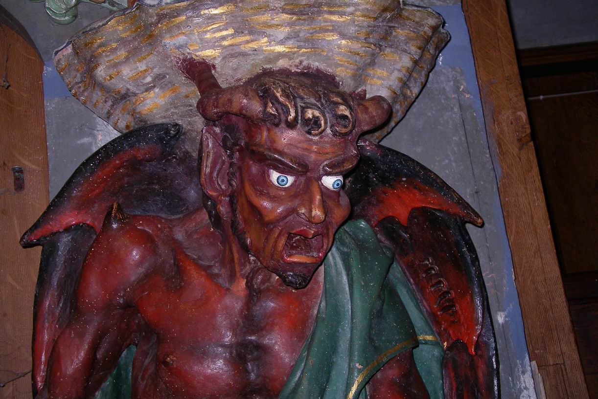 Teufelbildnis Rennes-le-Château